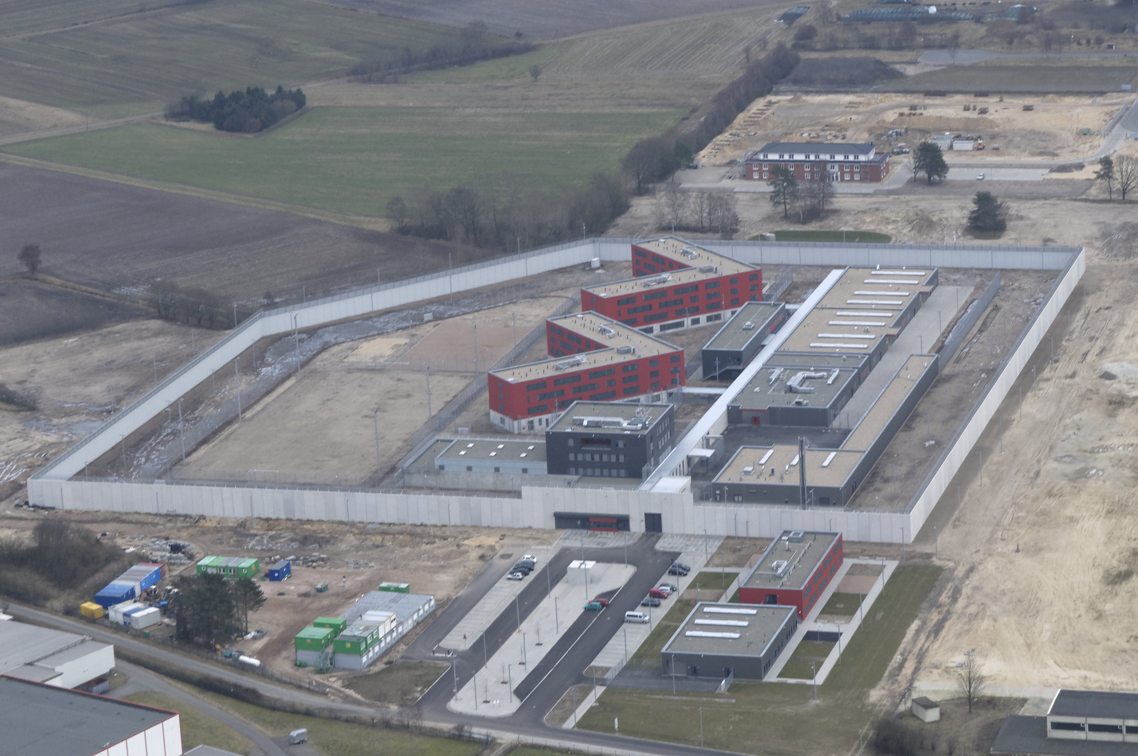 Neue JVA Bremervörde